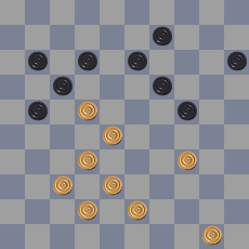 Zelfgemaakt diagrammetje van Hielslag